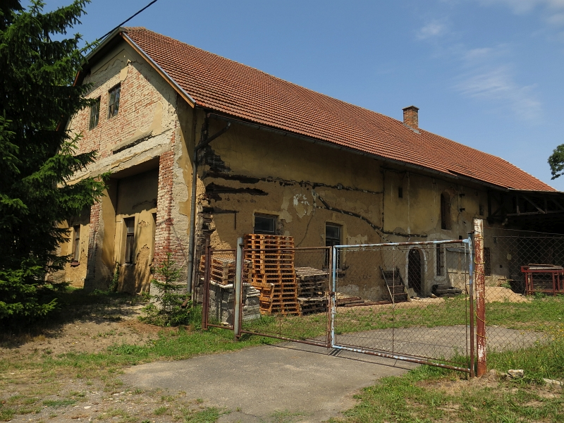 Usedlost čp. 2, Vračovice 2, Vračovice.